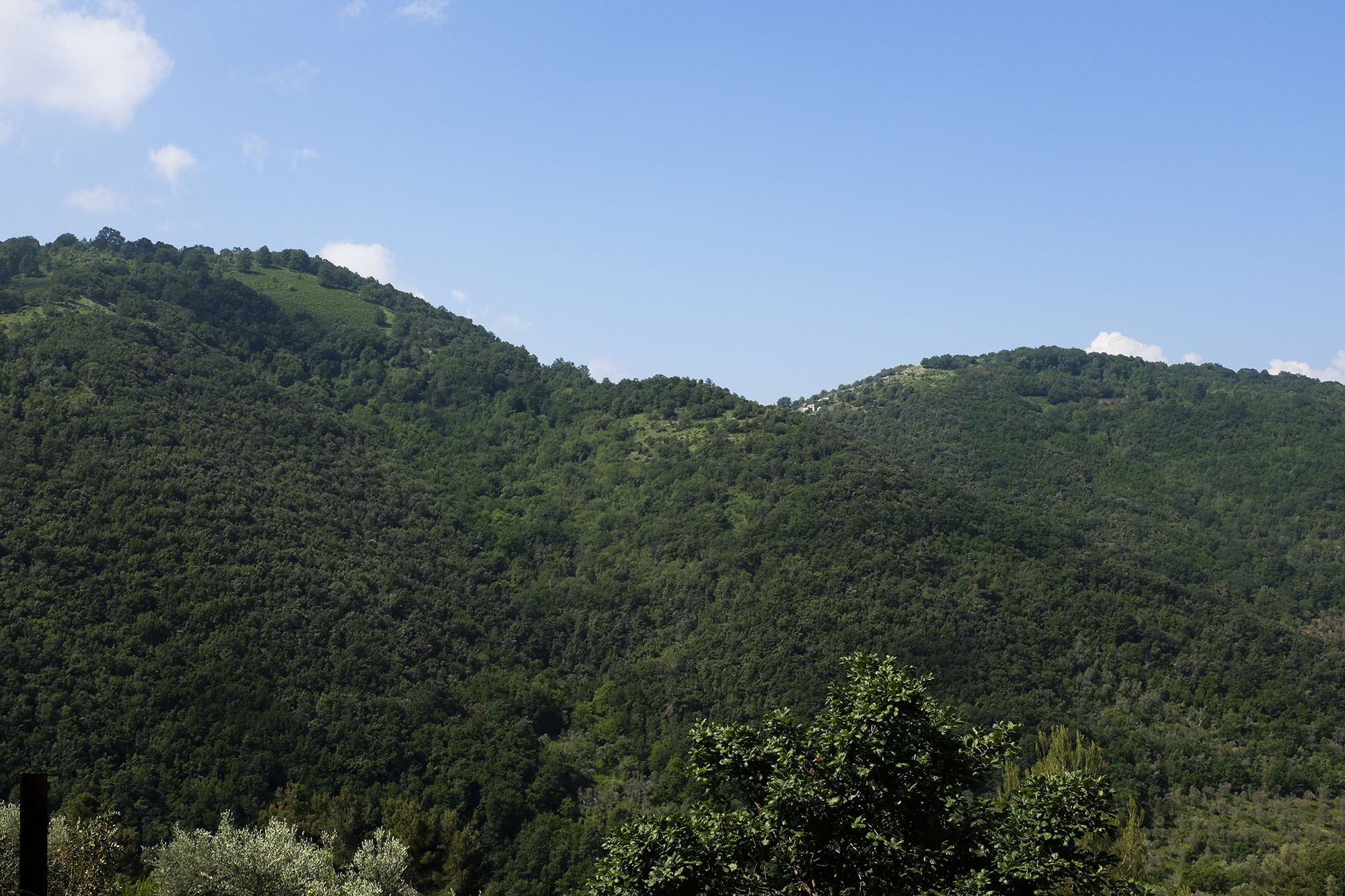 Vista del Monte Tribuna e del Monte Civita, località di alto interesse archeologico